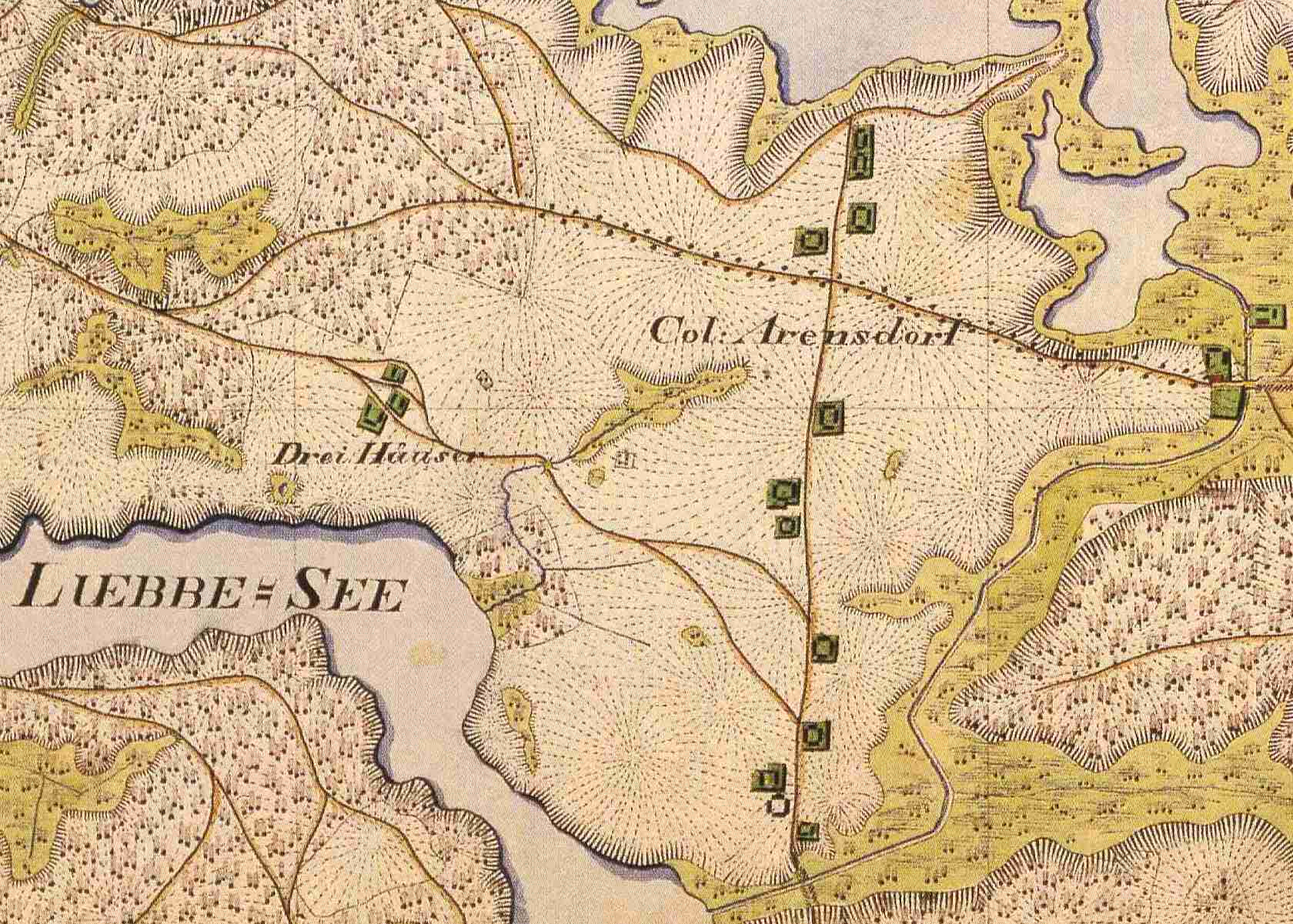 Ahrensdorf, Ortsteil der Stadt Templin, Lkr. Uckermark, Brandenburg, Deutschland, Ausschnitt aus dem Urmesstischblatt 2847 Templin von 1825